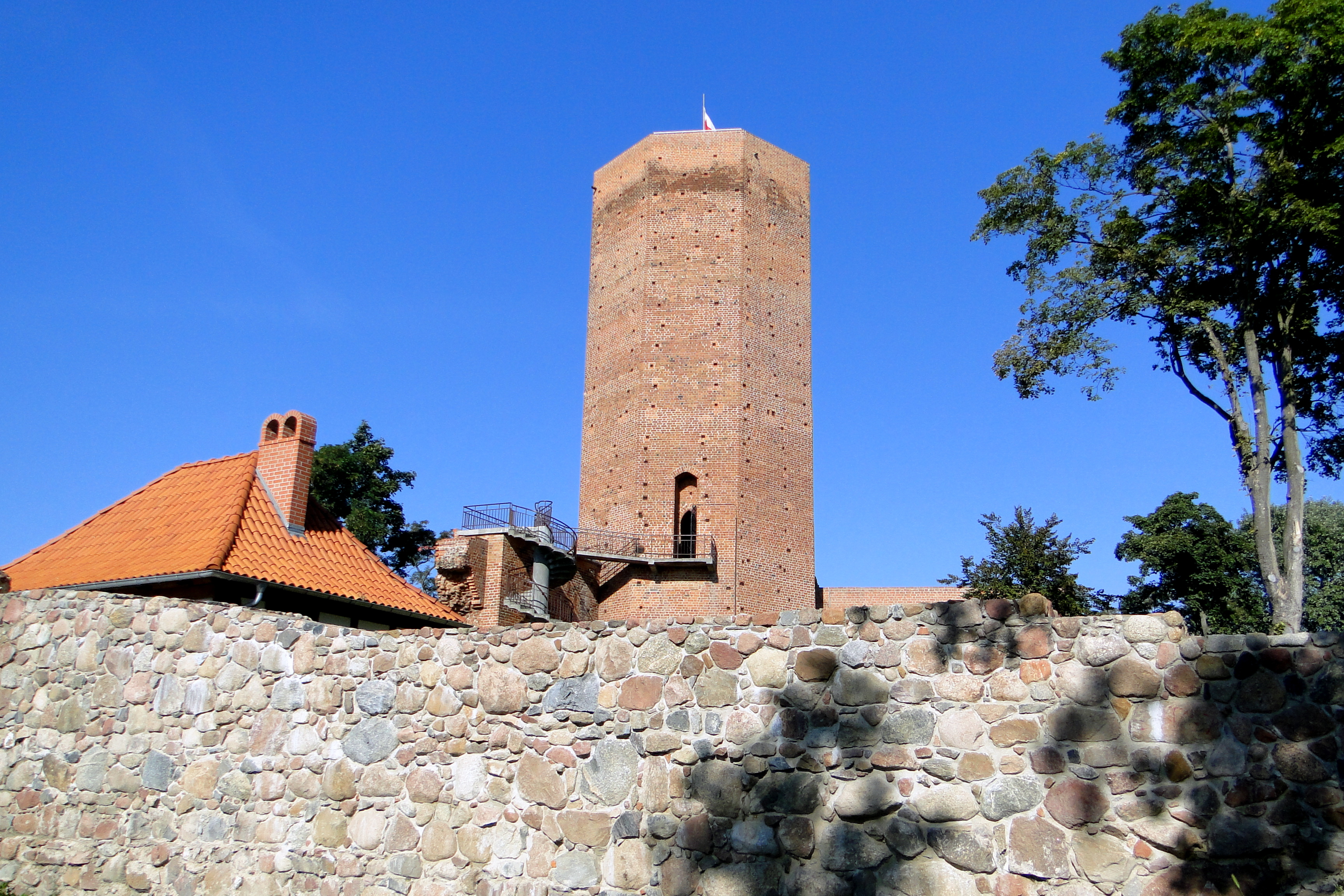 Kruszwica Ruiny zamku, tzw. Mysia Wieża, poł. XIV w.